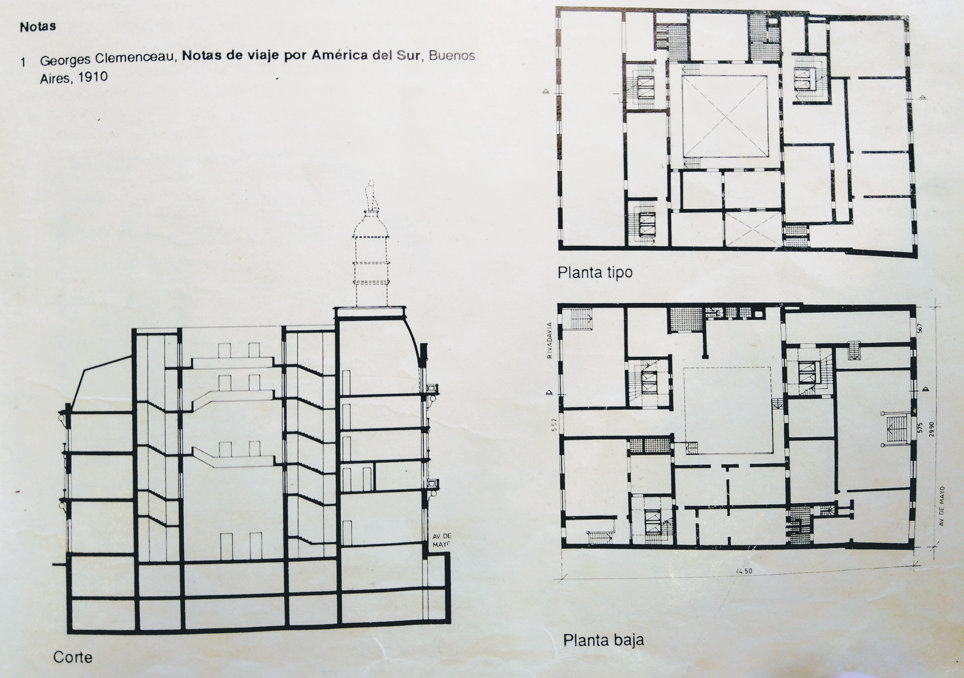 Espacialidades en corte y en planta de las diferentes funciones del edificio La Casa de la Cultura (Buenos Aires)